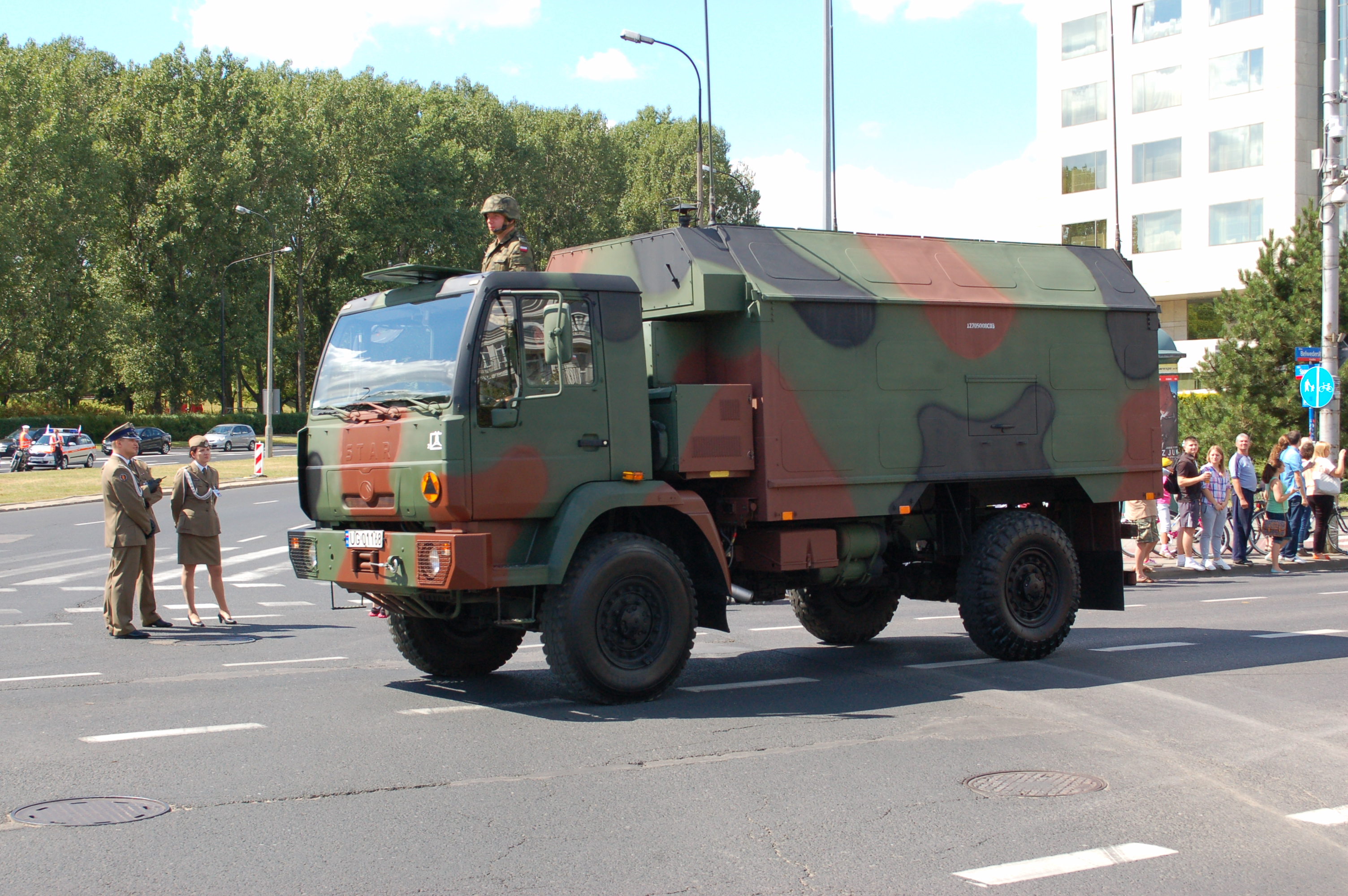 August 15, 2013 military parade in Warsaw